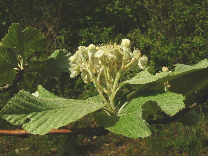 Alisier blanc, Bucey-lès-Gy, mai 2004